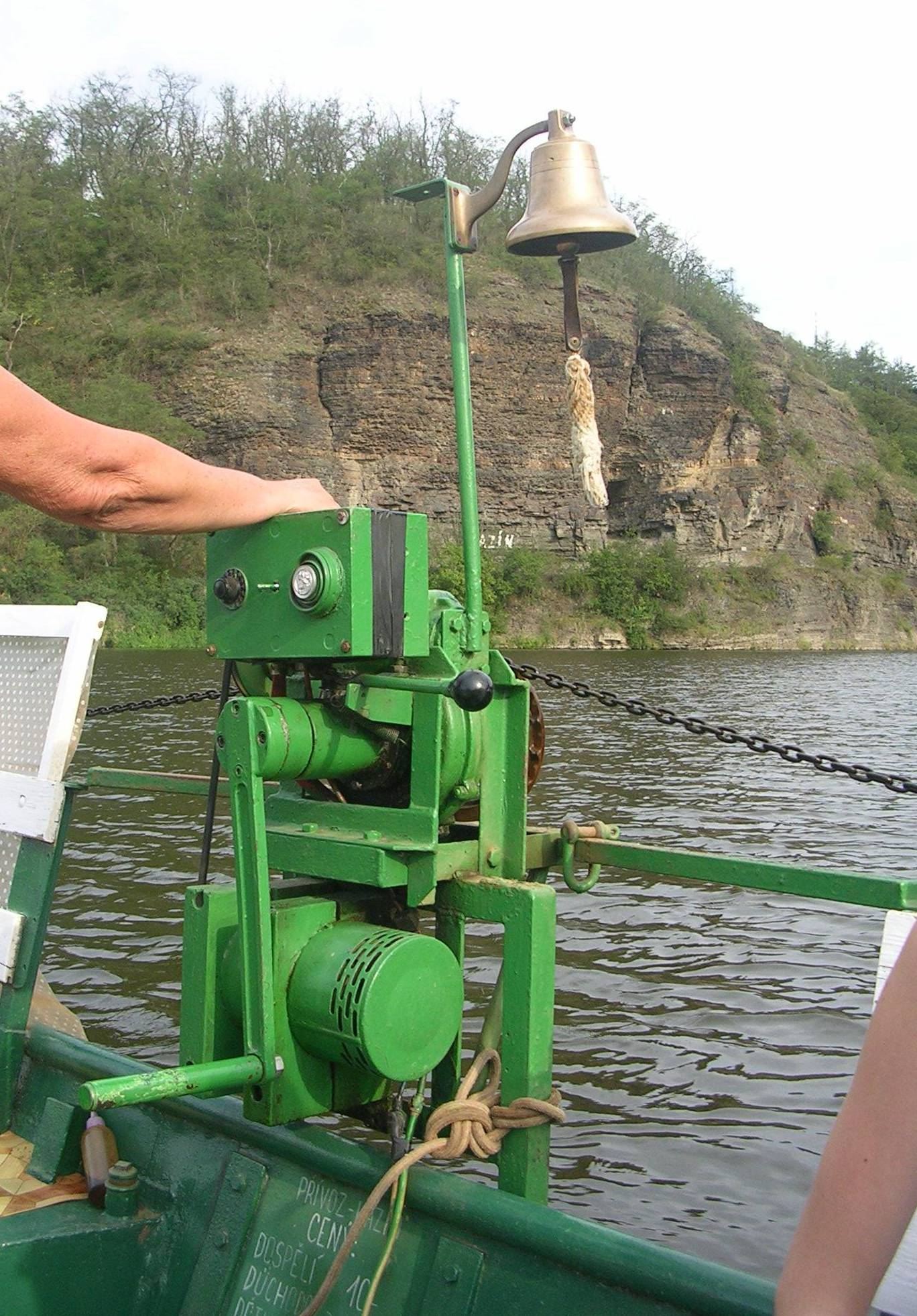 Pohon přívozu Dolní Mokropsy – Kazín.